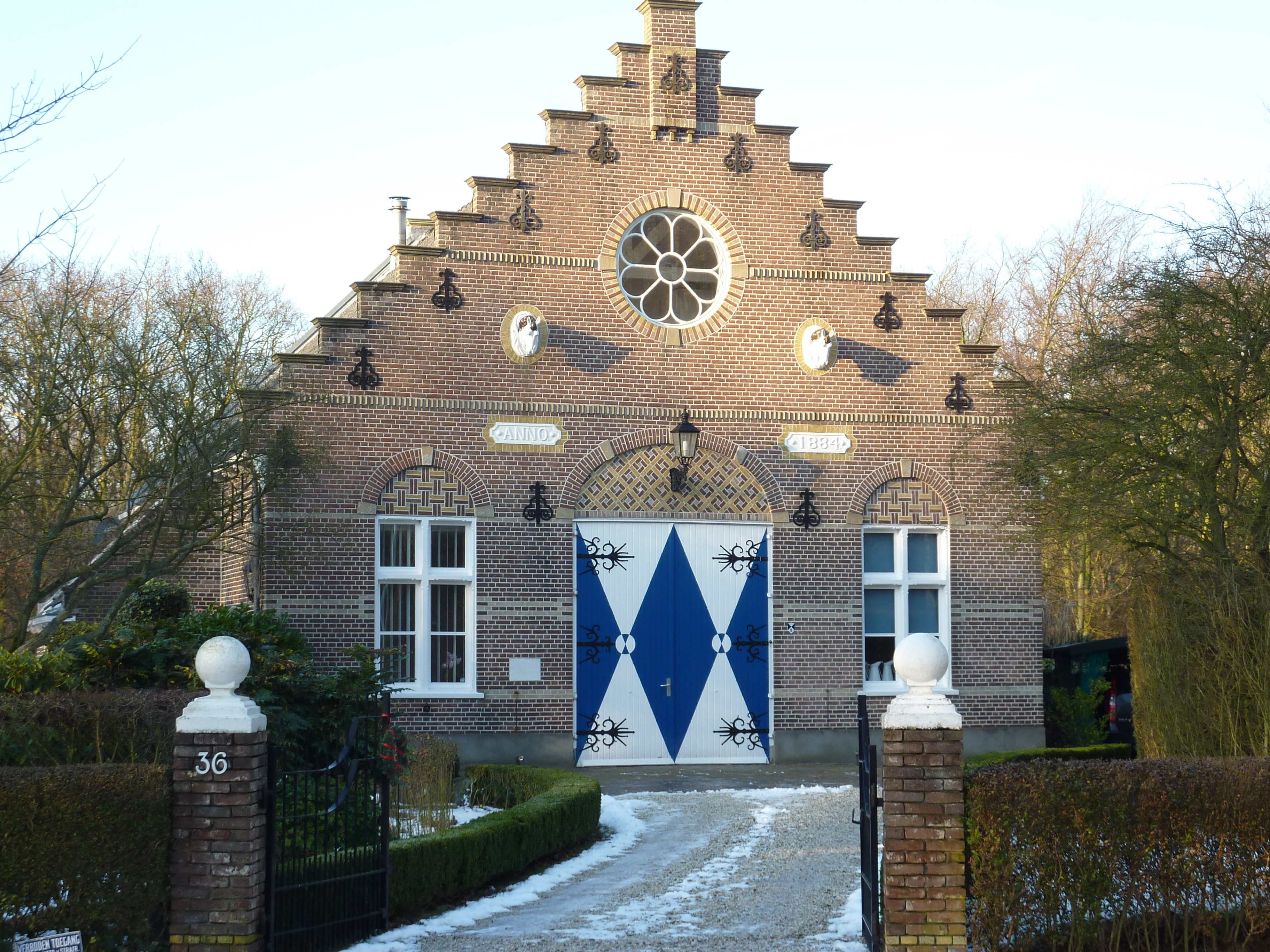 Noordwijkerhout, Koetshuis uit 1884